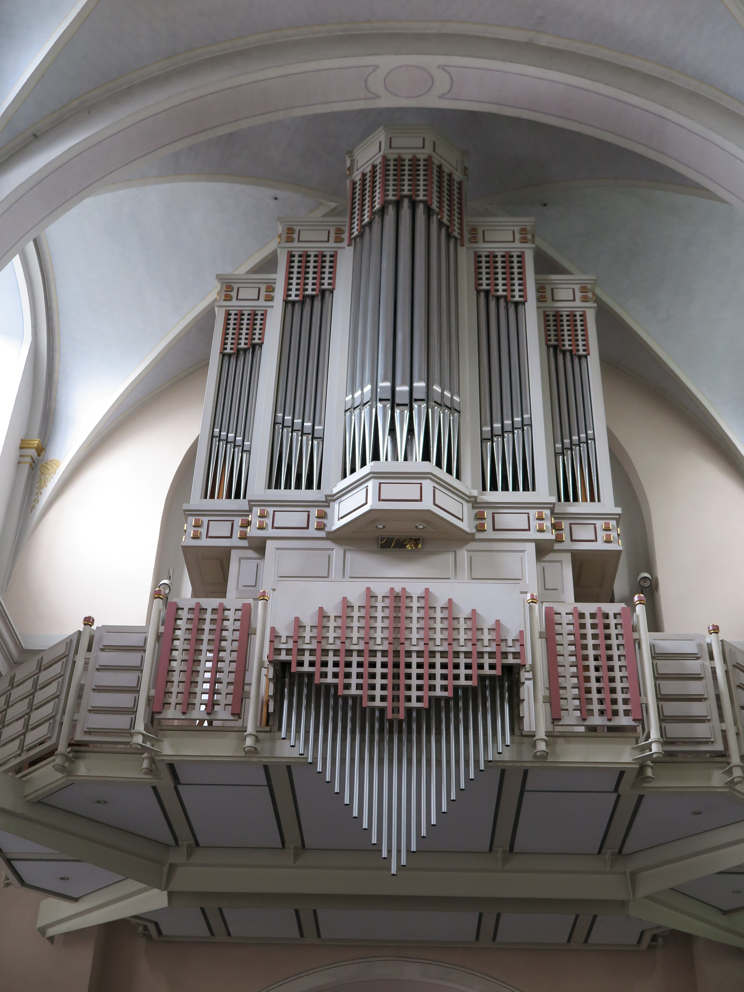 Orgel von St. Michael in Aachen-Burtscheid.